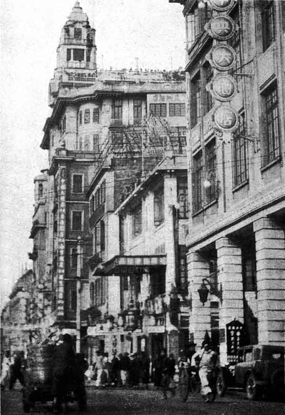 廣州市長堤大馬路，圖中可見中央大酒店。